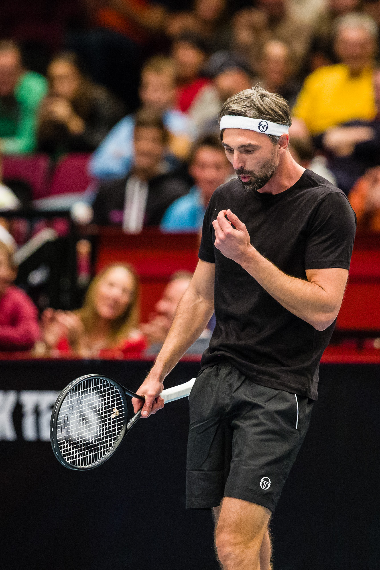 Tie Break Tens in Wien am 23.10.2016 (side event der Erste Bank Open ATP World Tour 500 2016)